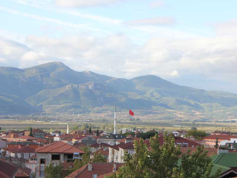 Pamukova dan güzel bir manzara ilçenin kuzey bölgesinden güneye doru çekilen gündüz görüntüsüdür.